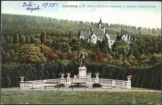 Kaiser Friedrich-Denkmal und Schloss Friedrichshof in Kronberg.